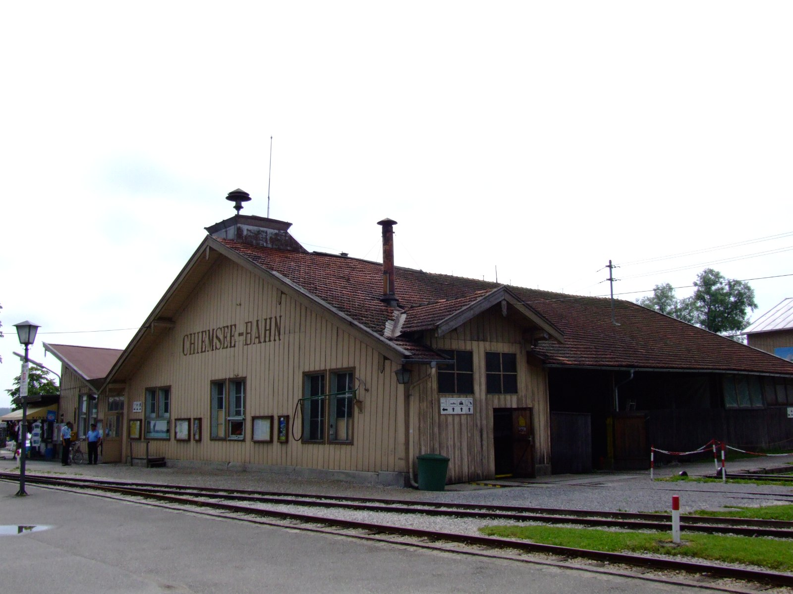 ChiemseeBahn Stock